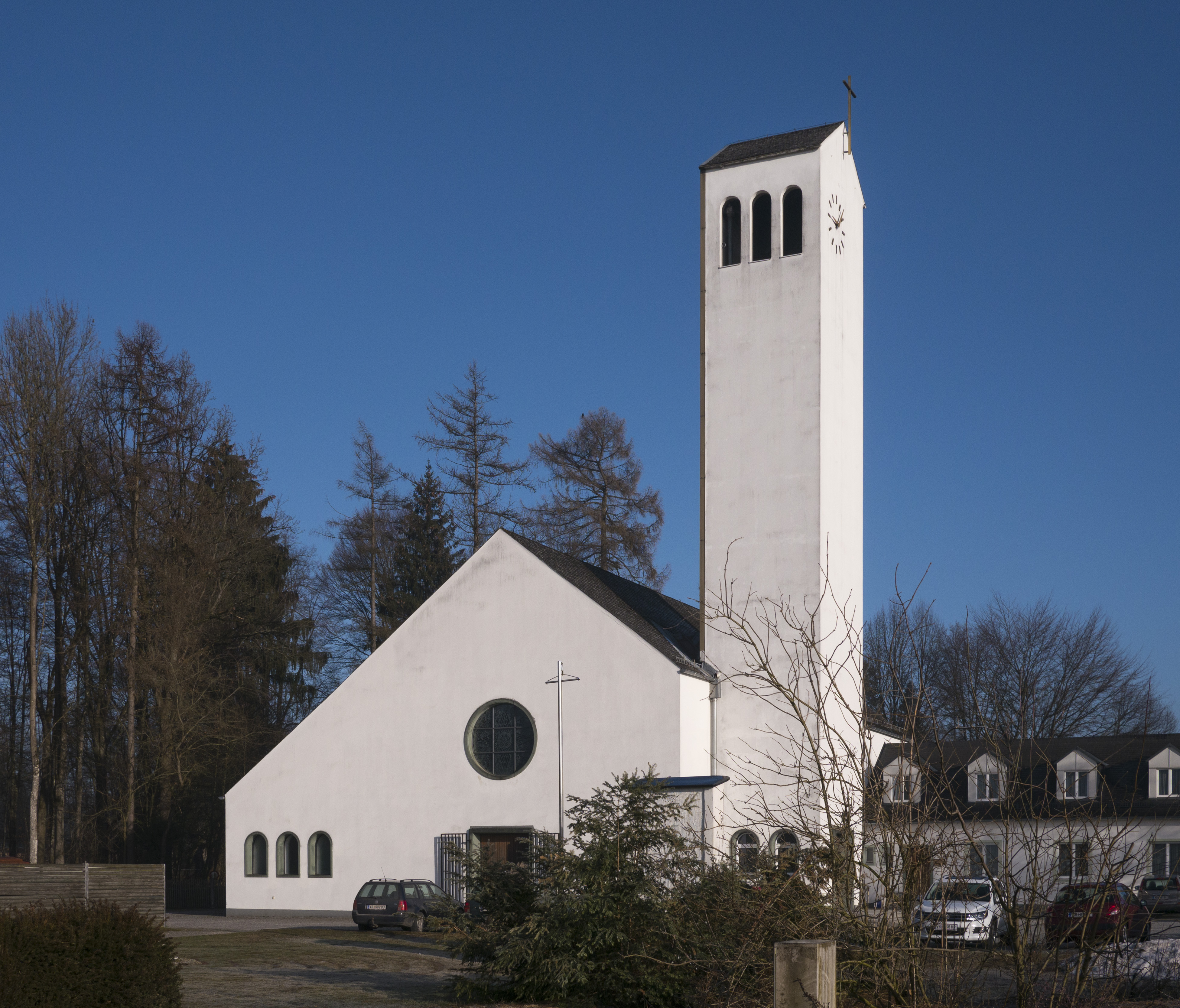 Pfarrkirche Zipf